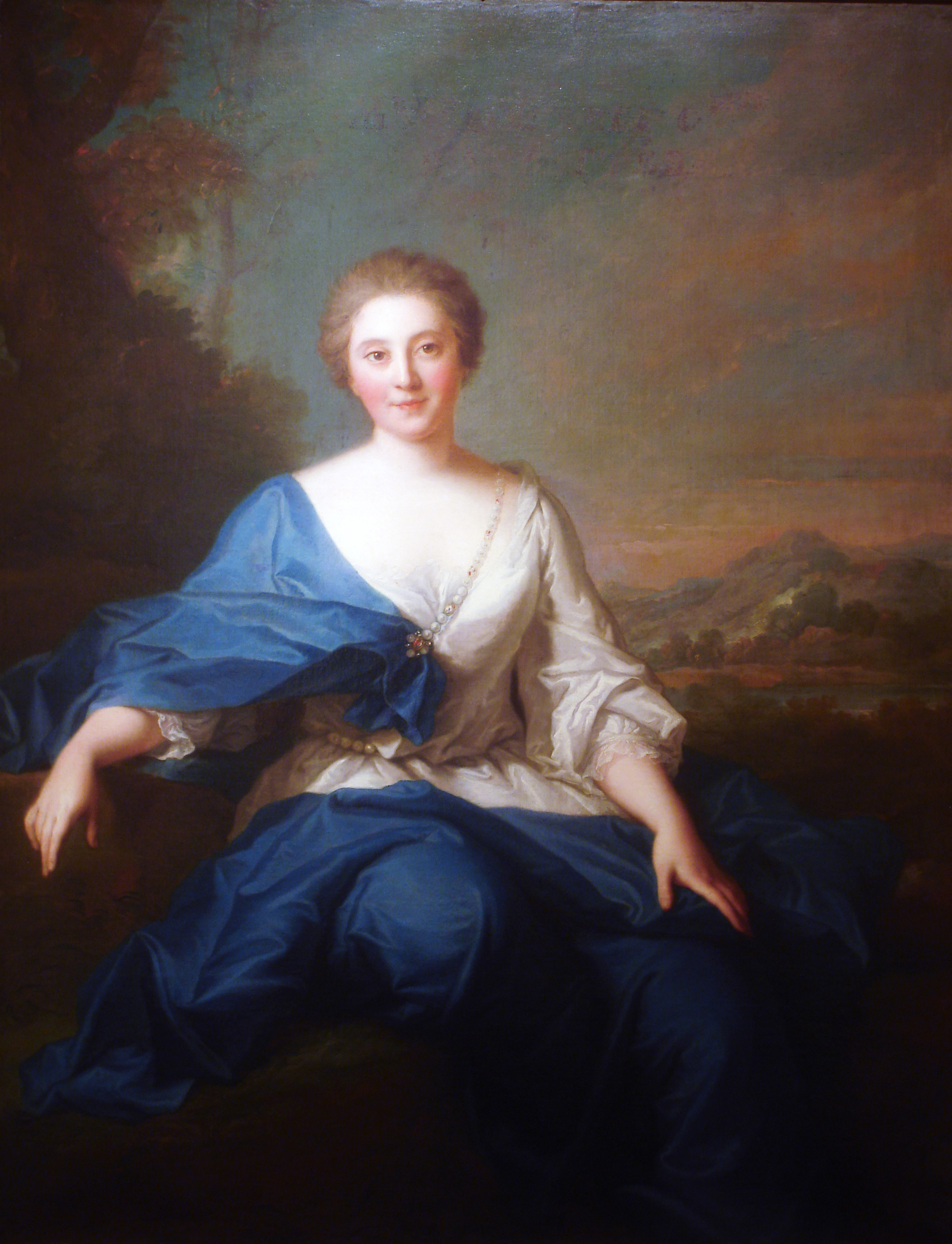 Retrato de Mlle. Henault, Comtesse d'Aubeterre